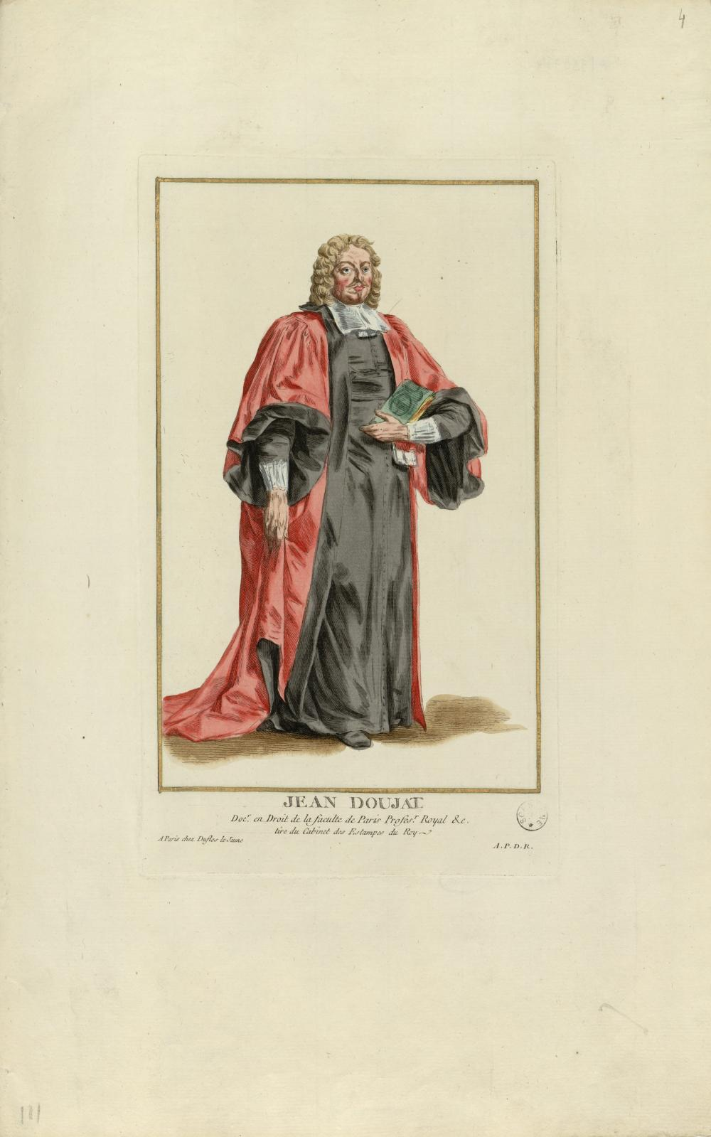 Jean Doujat (1609-1688). Estampe